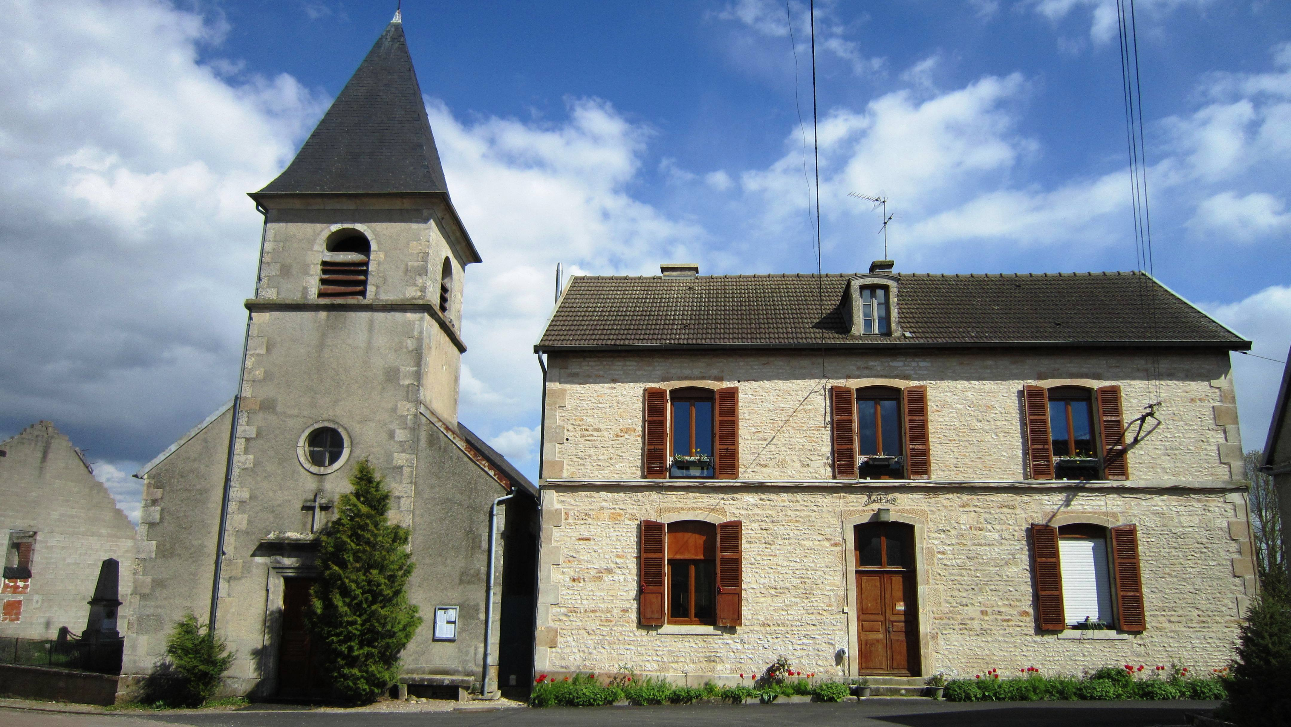 Eglise et mairie de Planay (Côte-d'Or)